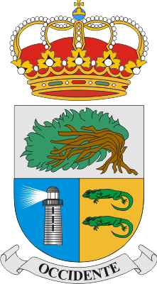 Escudo de La Frontera (El Hierro, Santa Cruz ce Tenerife, España)